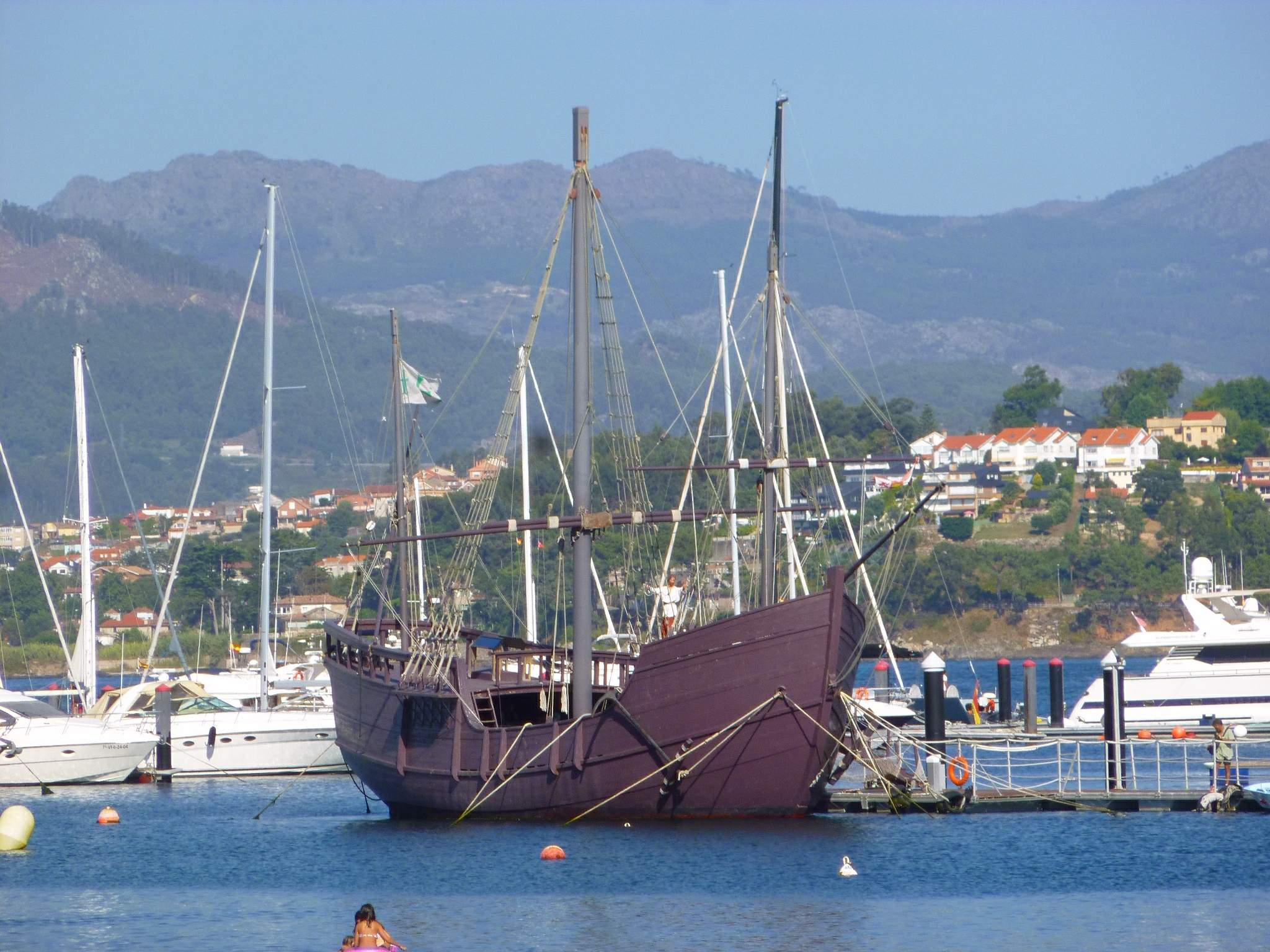 Baiona - Museo-Réplica de la Carabela Pinta